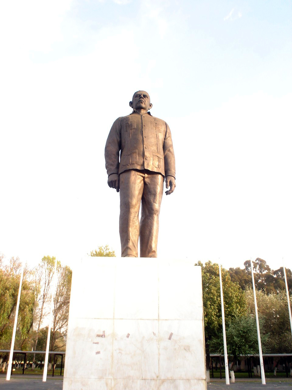 MONUMENTO AL GENERAL LAZARO CARDENAS DEL RIO EN EL I. P. N. EN LA PLAZA ROJA